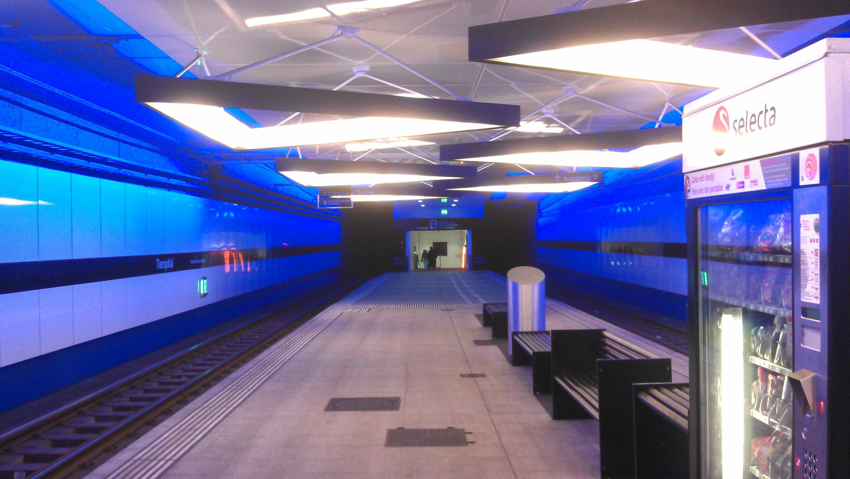 Haltestelle Tierspital nach Umbau